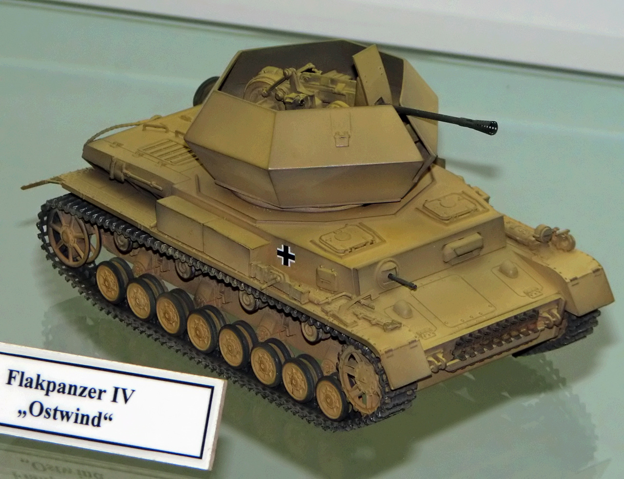 Dieses Bild zeigt ein Modell des Flakpanzers "Ostwind".